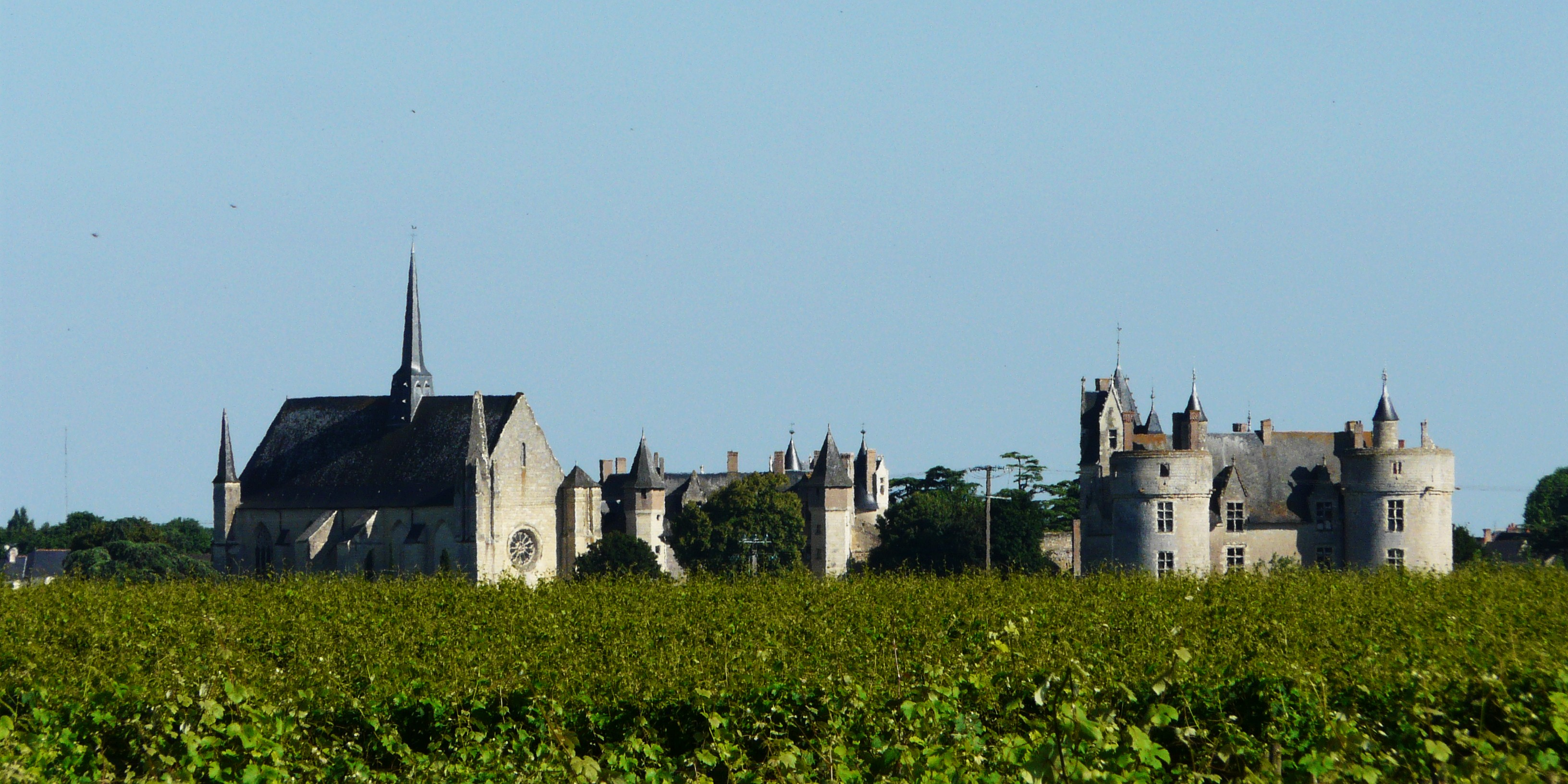 Montreuil-Bellay : de gauche à droite la collégiale, le châtelet et le château-neuf